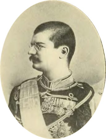 El rey Alejandro I de Serbia